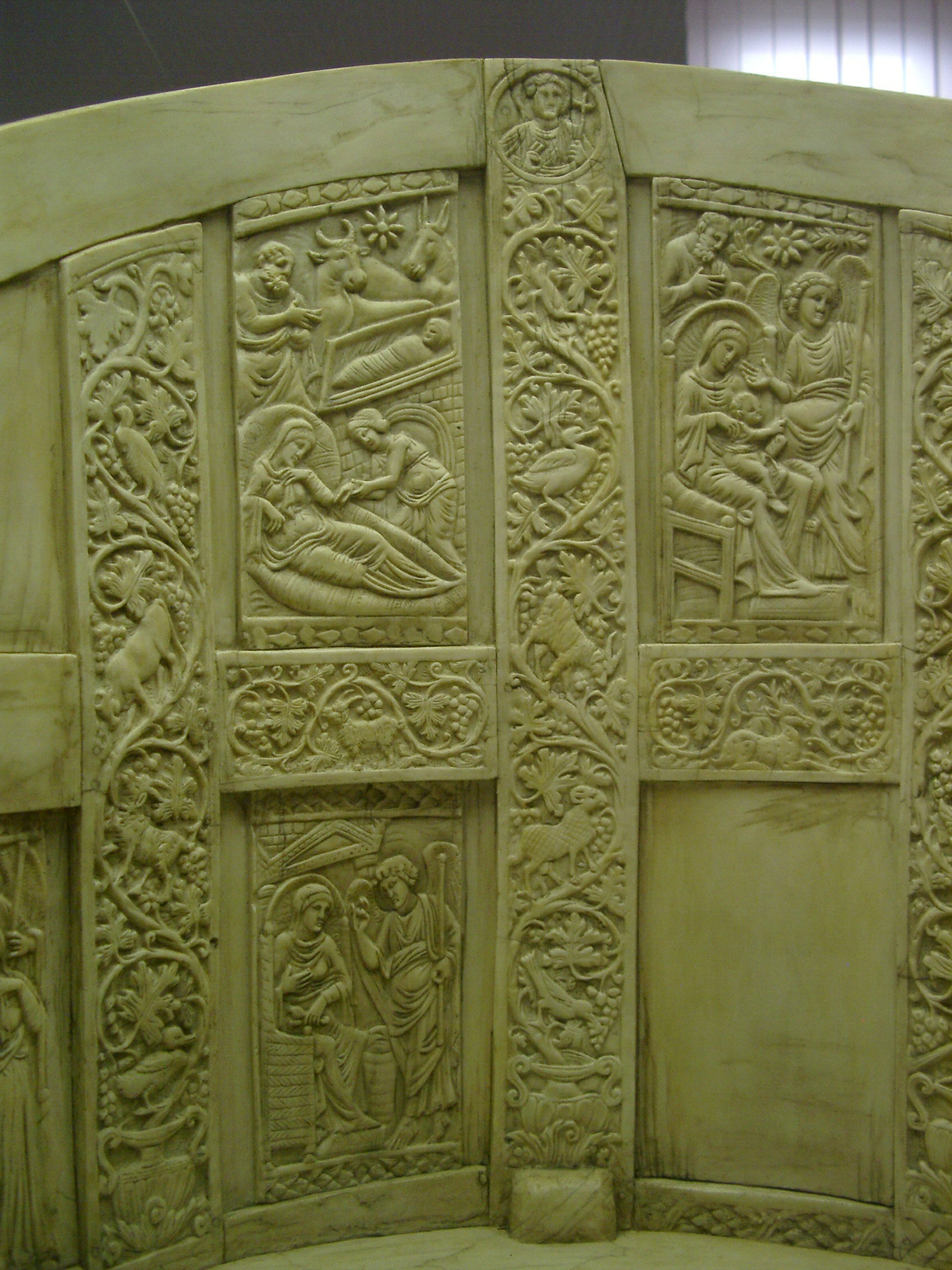 catedra